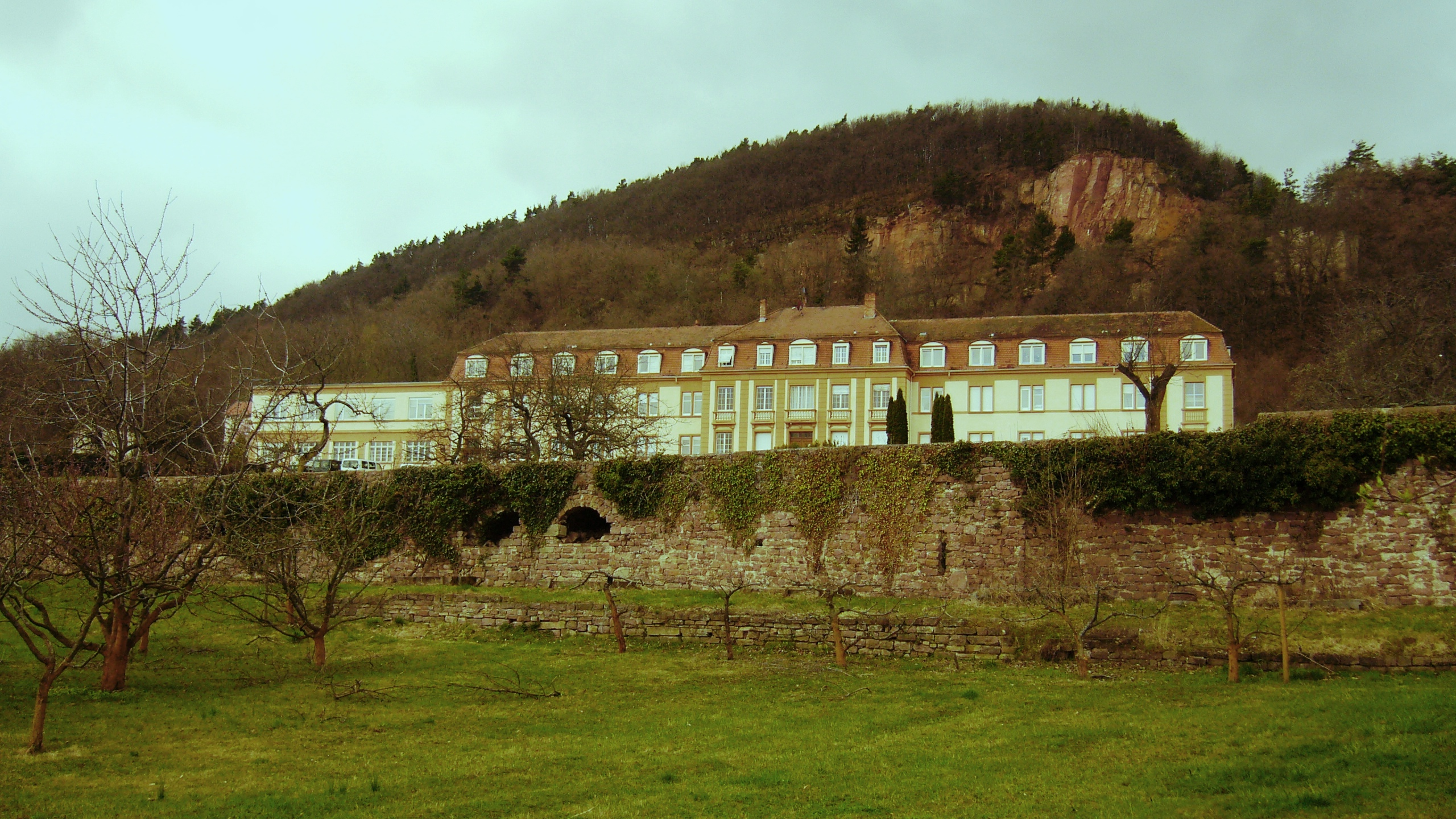 Abbaye de Marbach 018.JPG